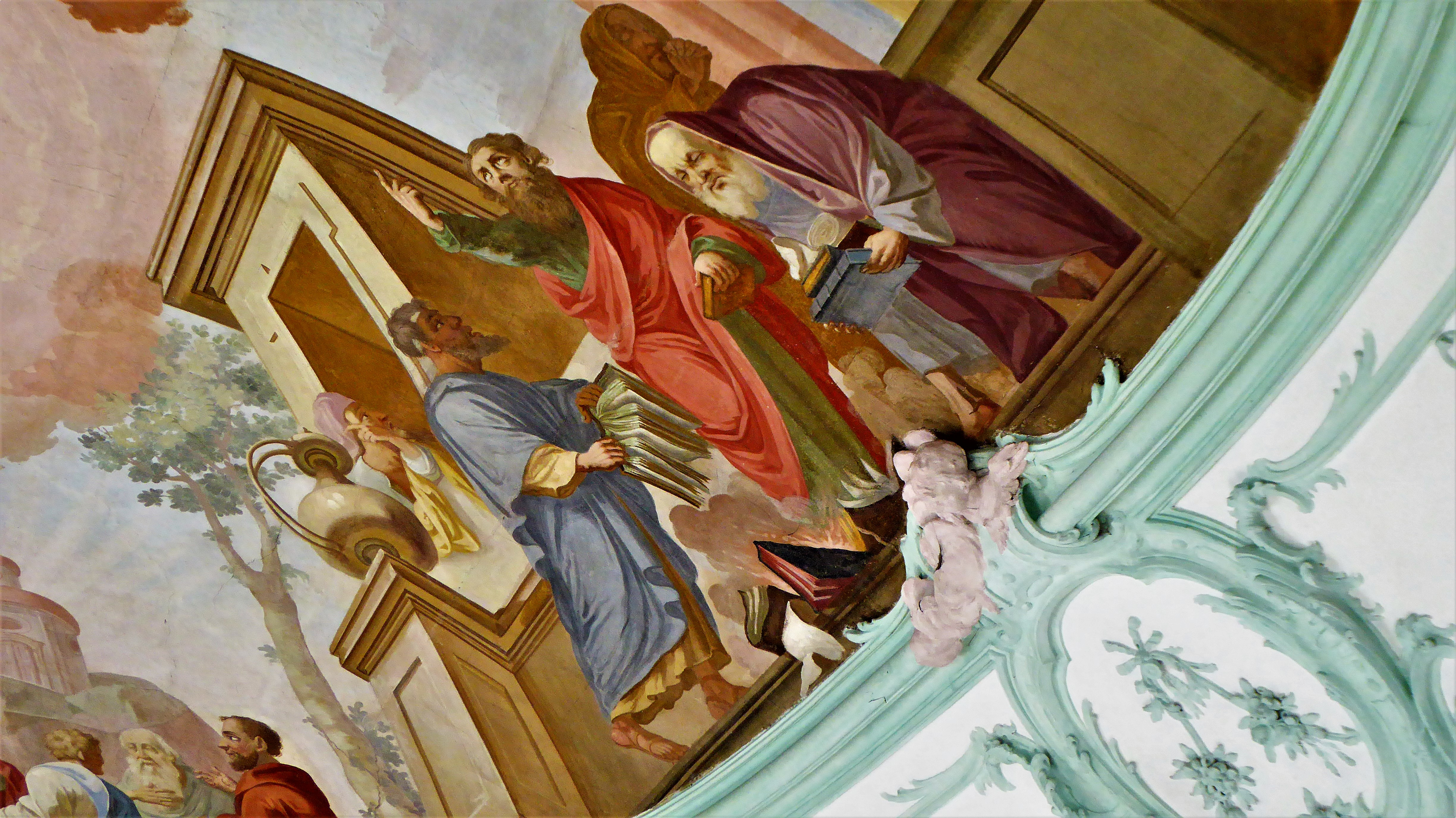 St.Paulus in Ephesus bei der Bücherverbrennung, Detail des Deckenfresco des späten Rokoko von Alois Gaibler aus KaufbeurenThis is a photograph of an architectural monument.